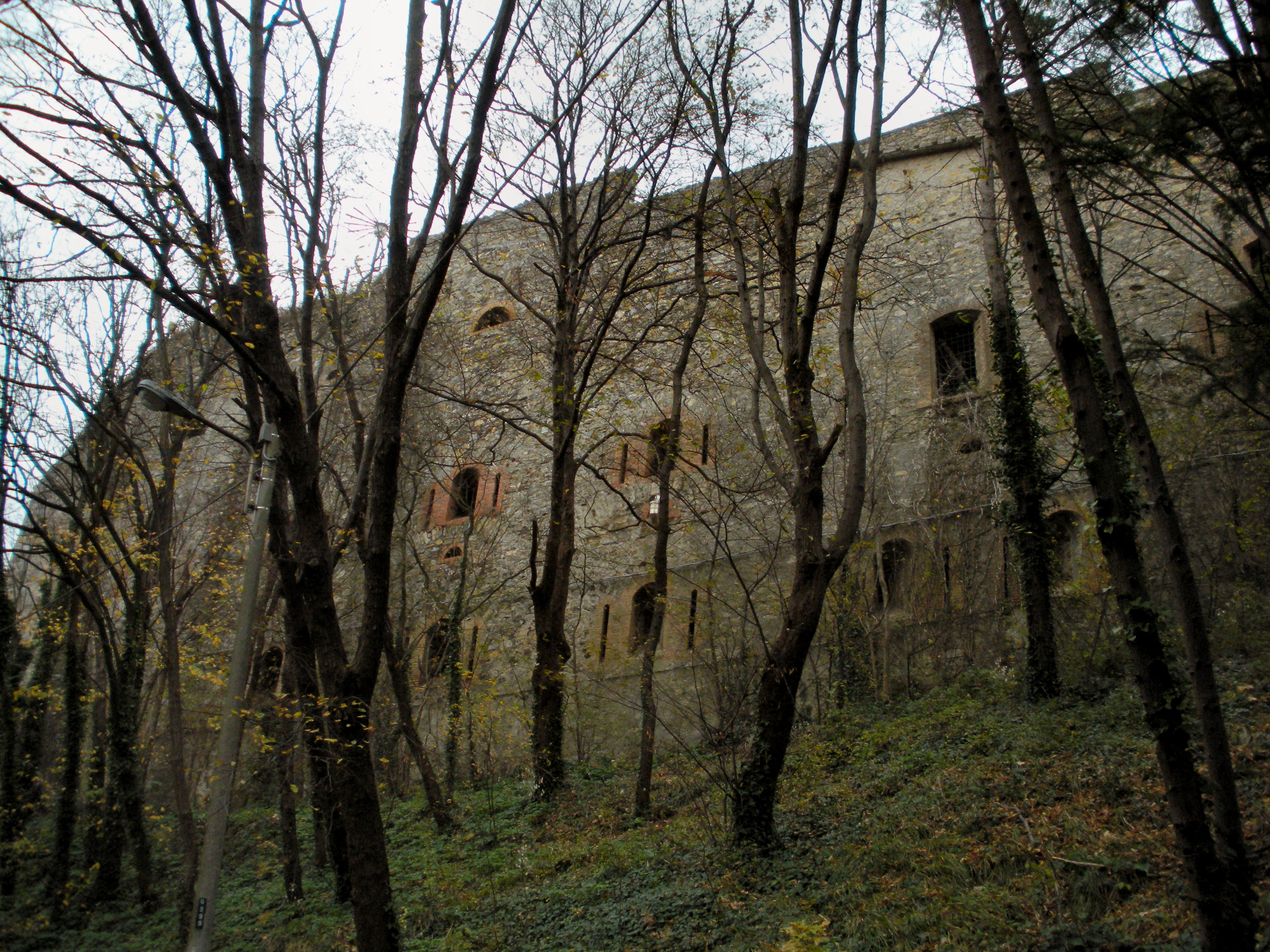 Genova, forte Castellaccio, la facciata della caserma affacciata su via del Peralto